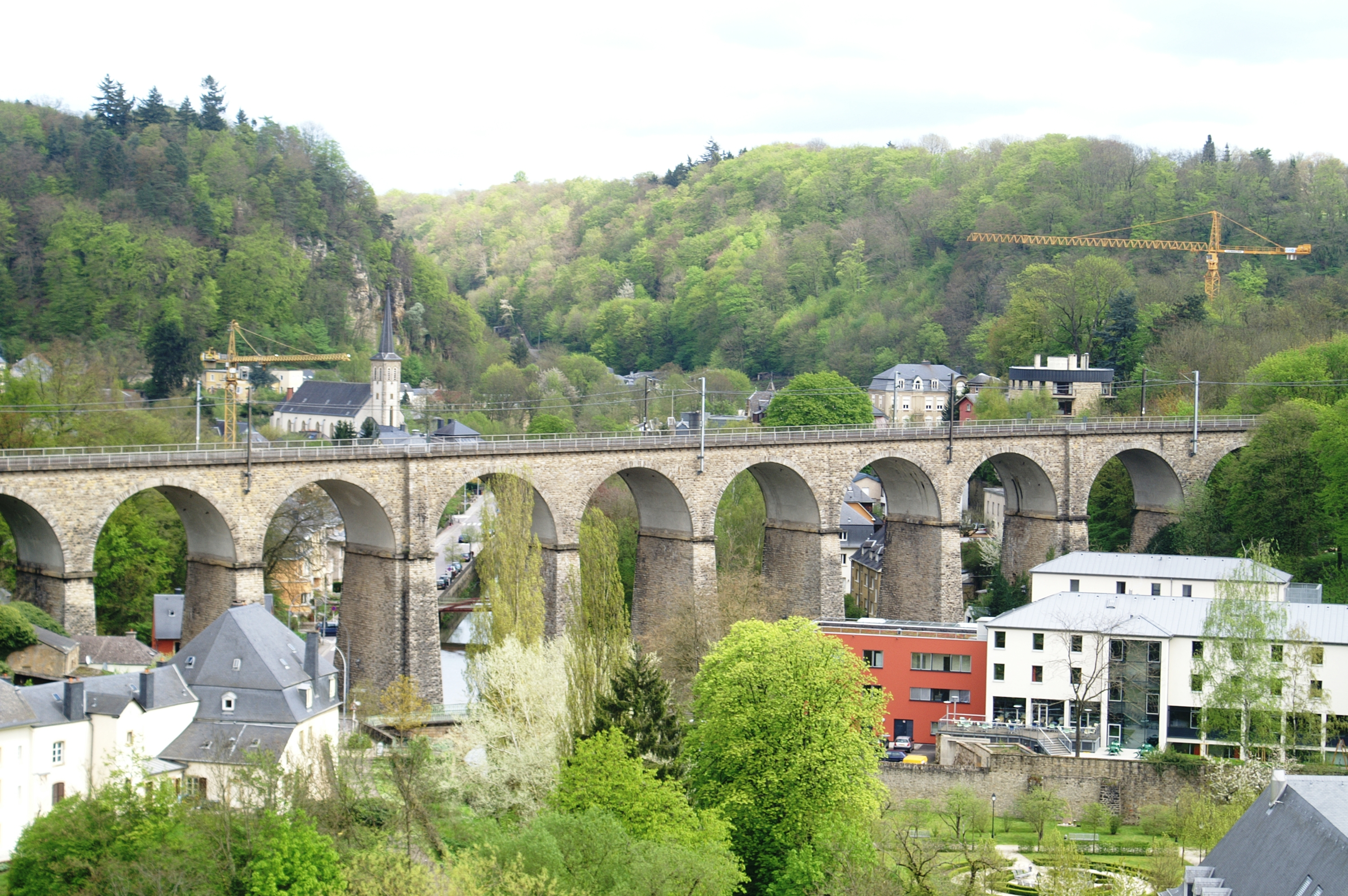 Hoofdstad Luxemburg